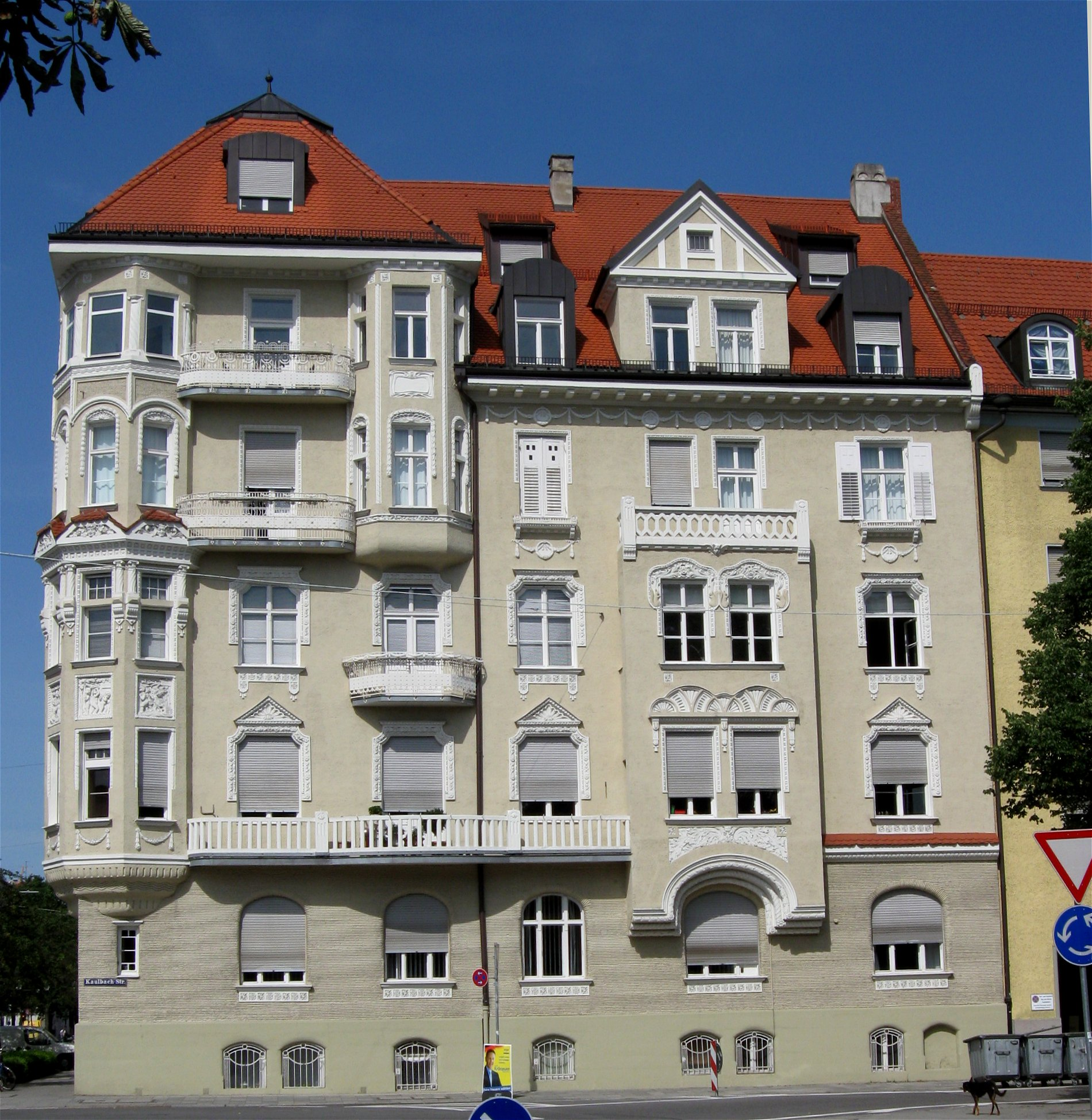 Haus Martiusstraße 7, München